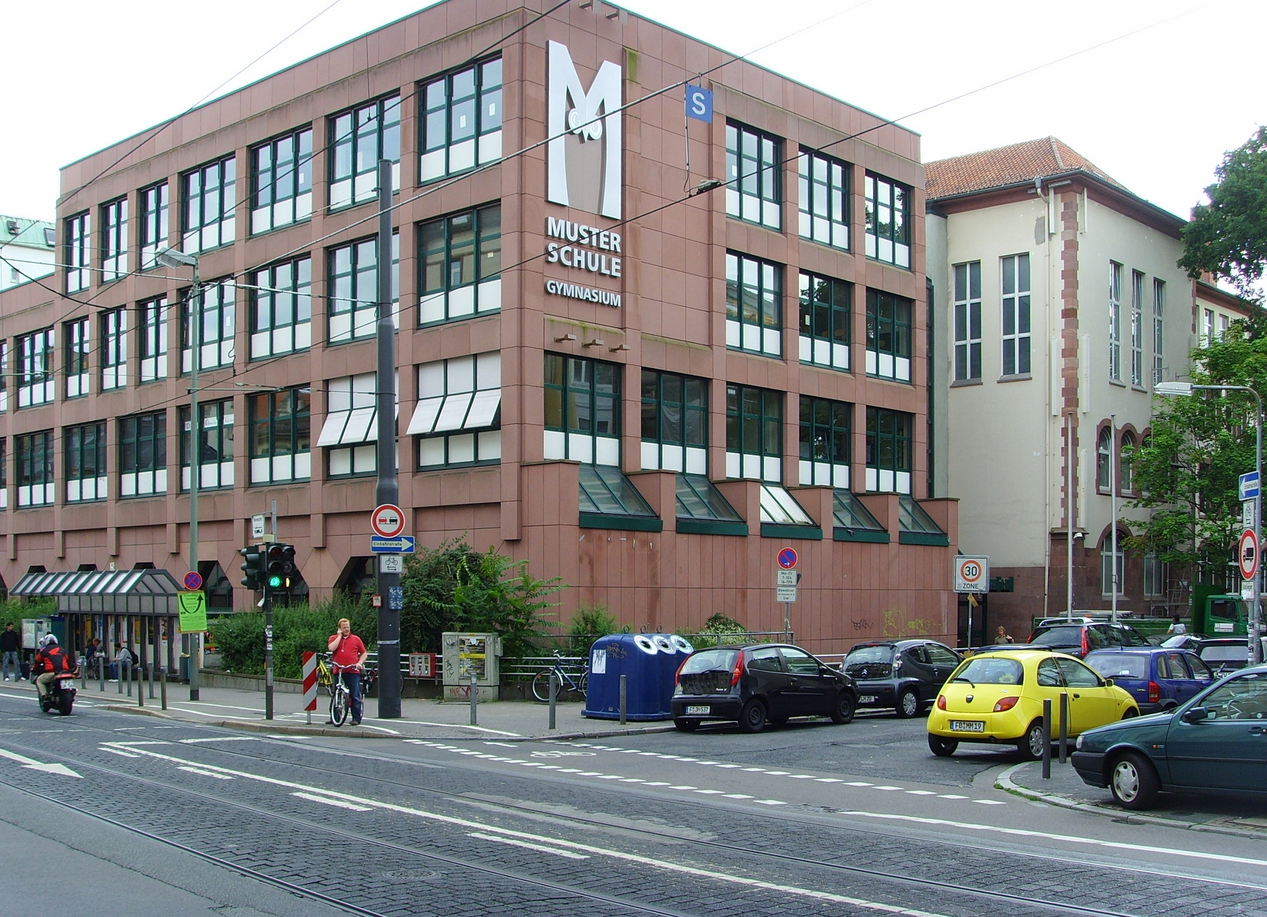 Gebäude der Musterschule in Frankfurt am Main (Teilansicht)